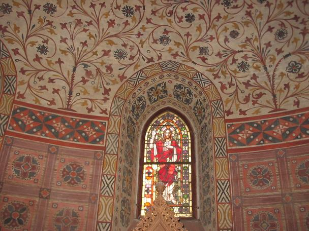 Kirche Gröben, Brandenburg. Chor mit Auferstehungsfenster.